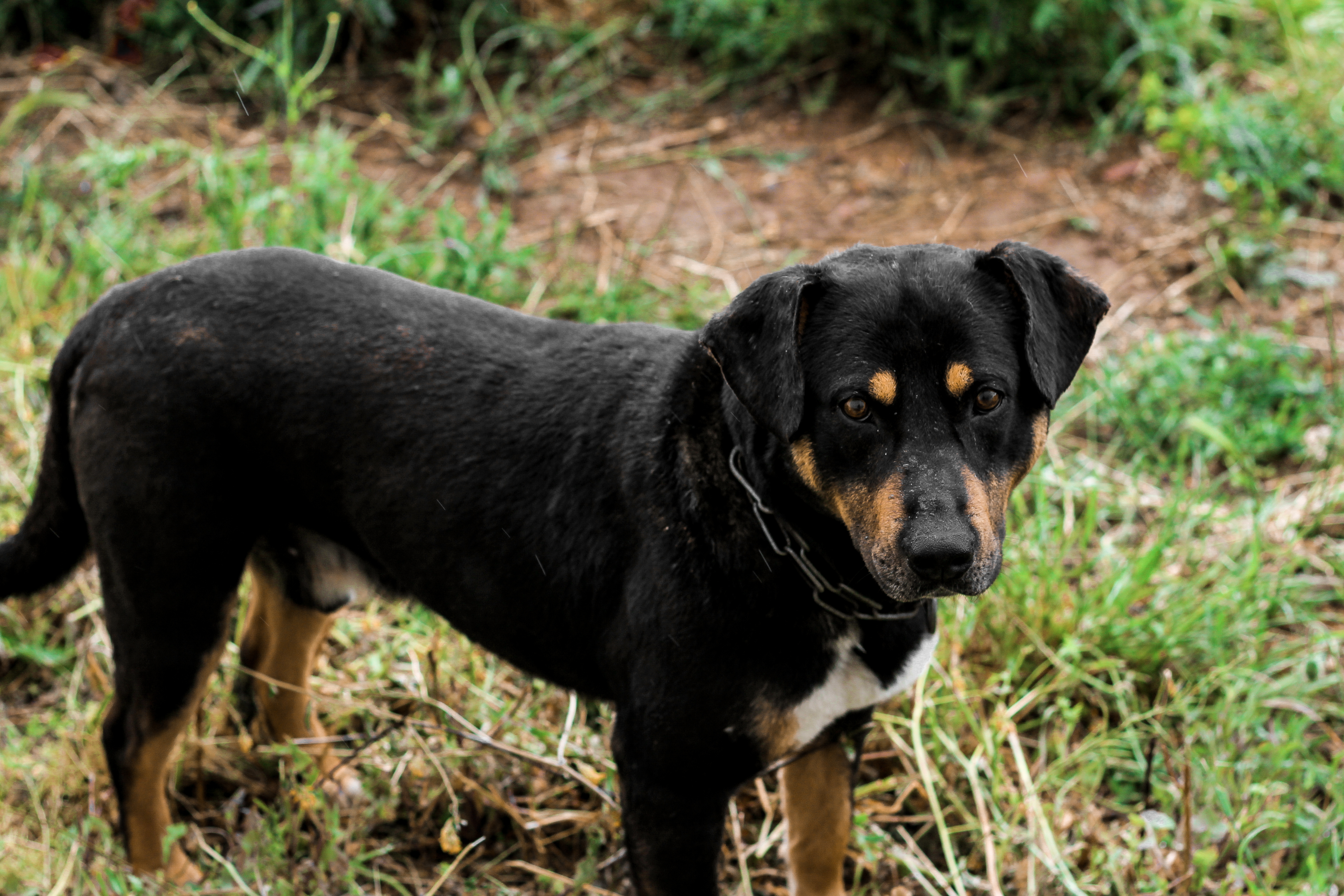 Un pastor carea de cuatro ojos.